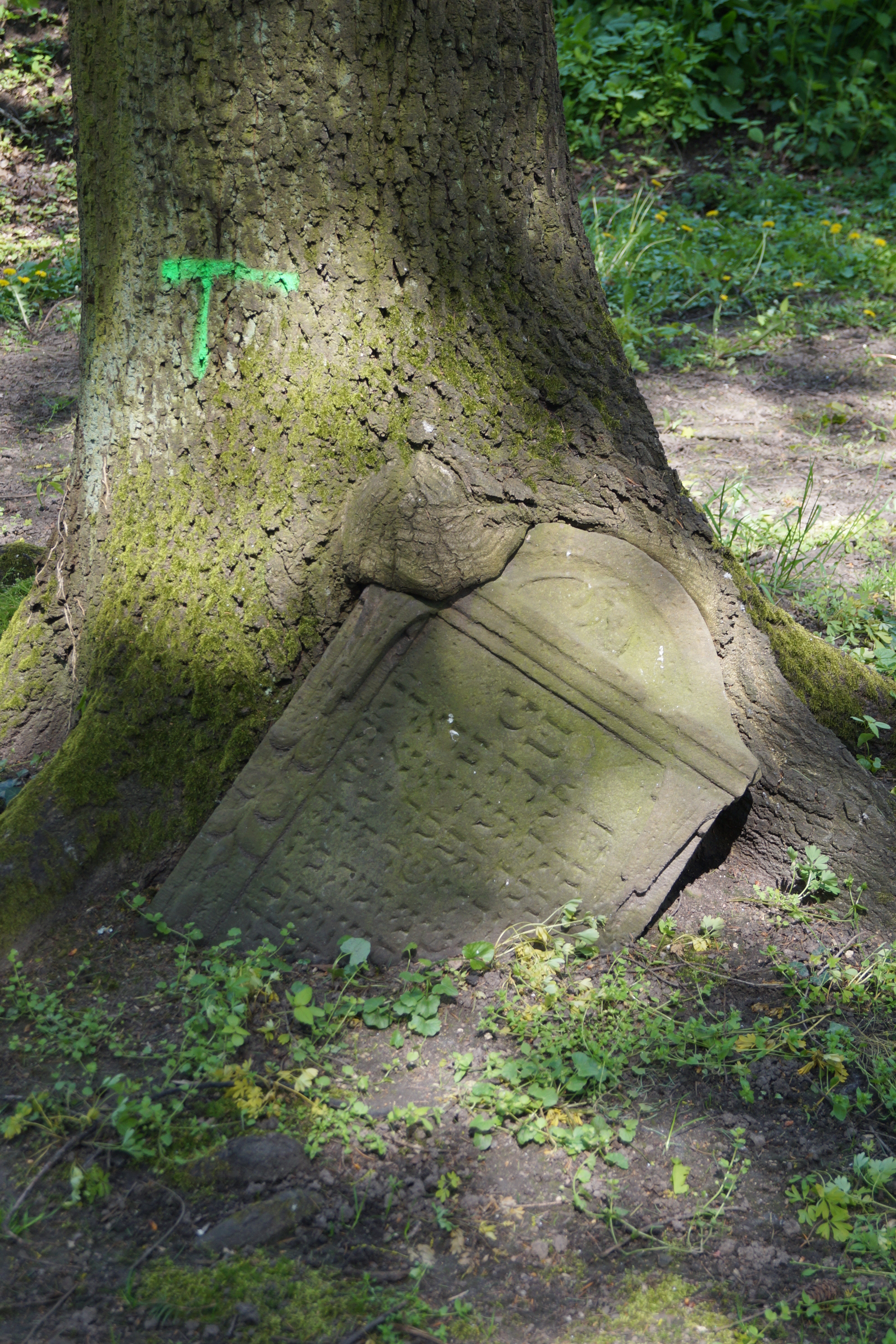 Alter Jüdischer Friedhof in Hanau, Feld 2, in den Wurzelbereich einer Eiche eingewachsener Grabstein von Fradel Una, gest. am 09.06.1764, Hauszeichen Eichel (stark verwittert), siehe „Una, Fradel (1764) – Hanau“, in: Jüdische Grabstätten (Stand: 21.1.2016)